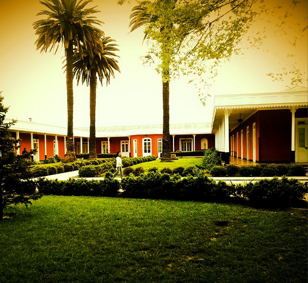 Parque nuestra señora de Gabriela en la comuna de Puente Alto